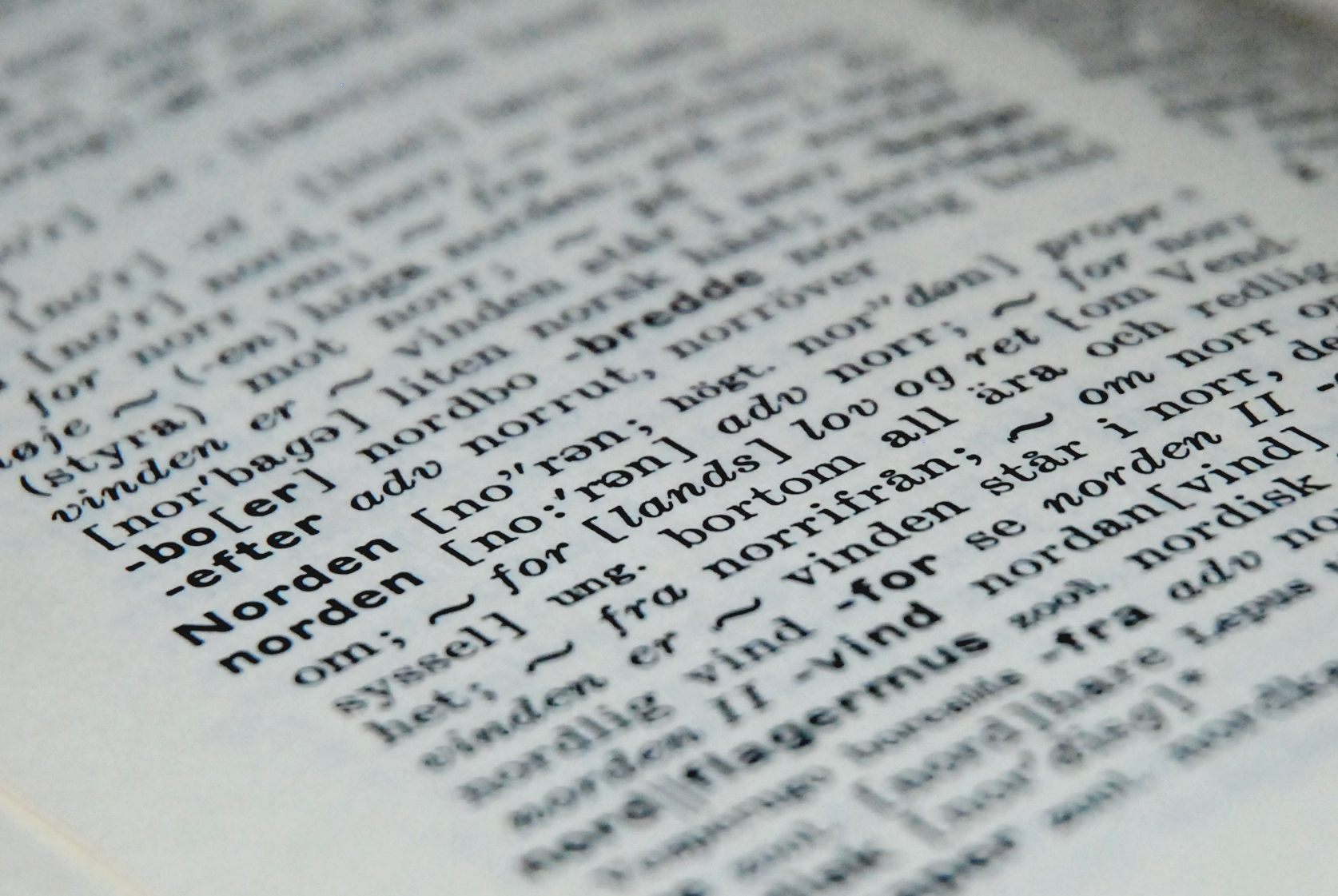 Ordbog